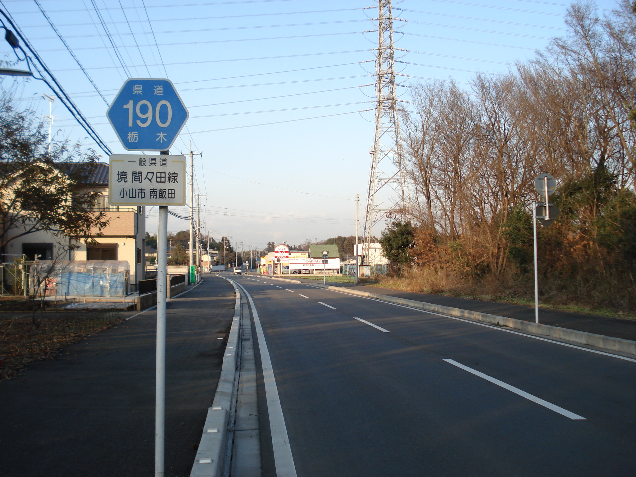 茨城県道・栃木県道190号境間々田線 栃木県小山市南飯田